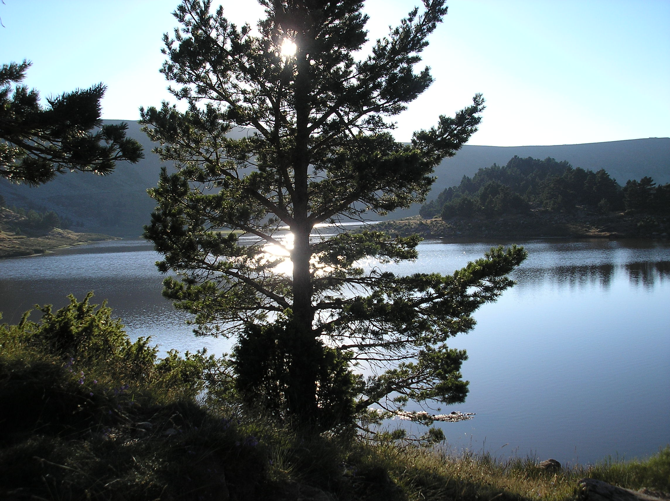 Lagunas de Neila Burgos. Spain